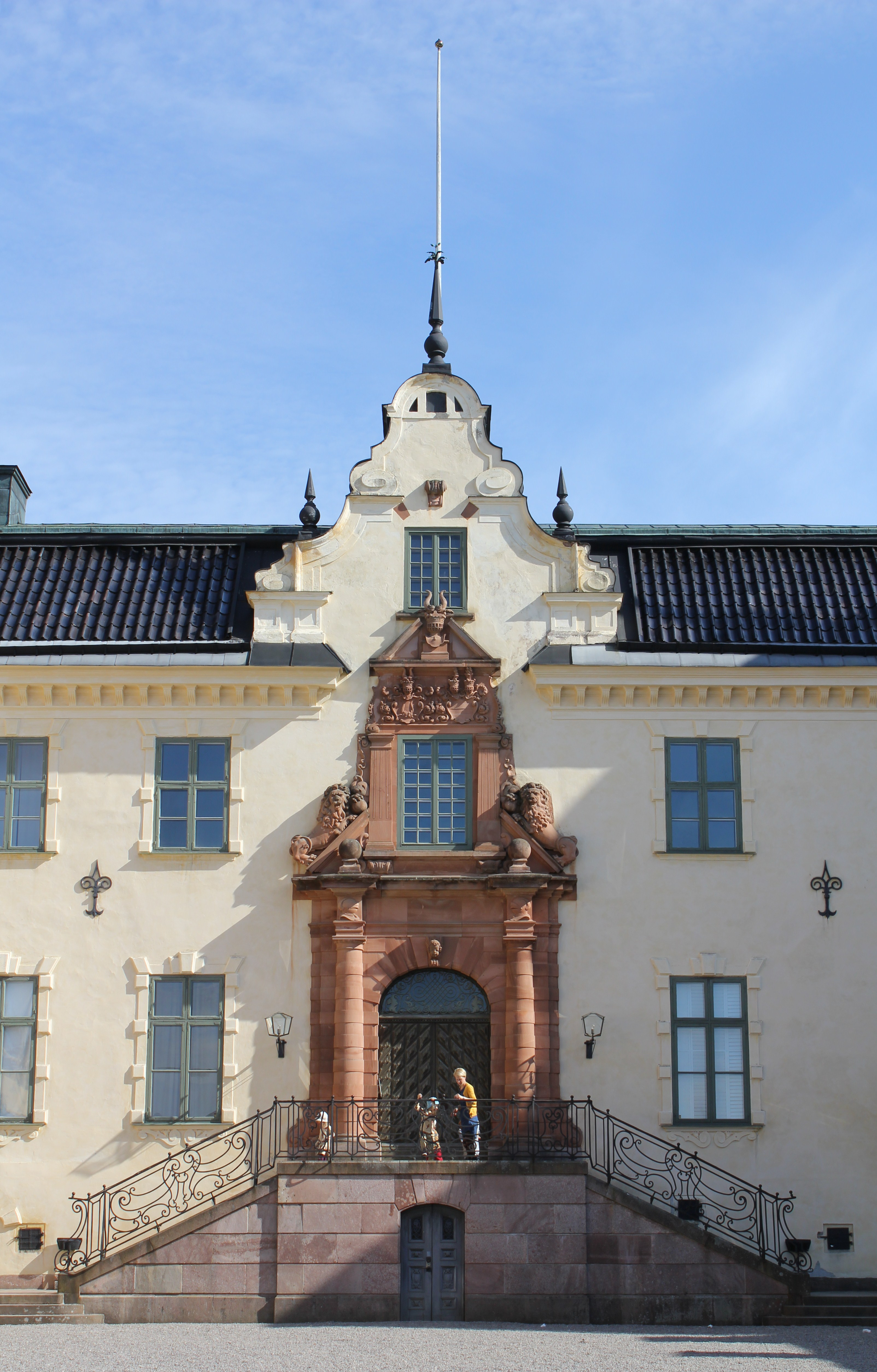 Tyresö slott. Port och fritrappa.